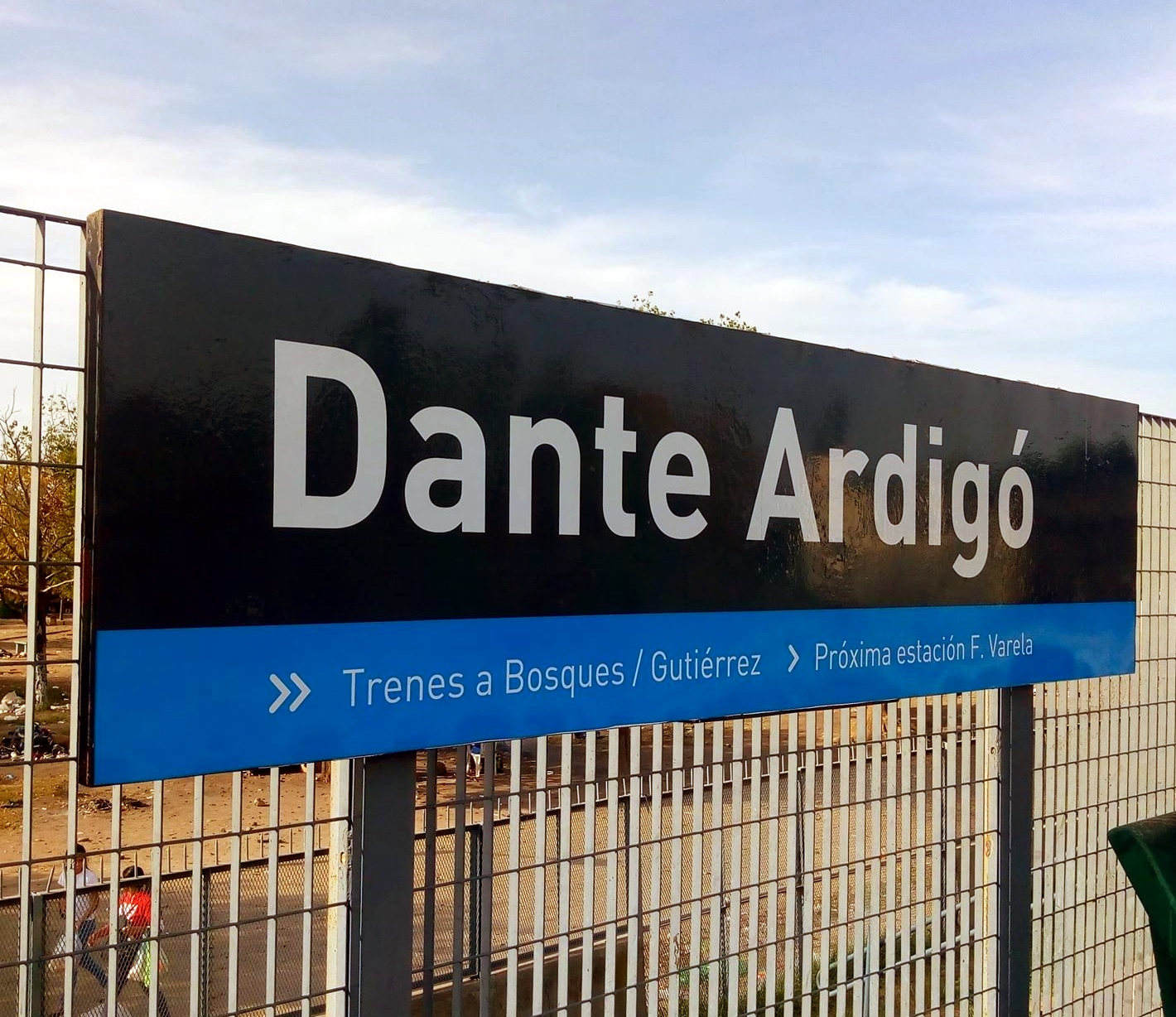 Nomenclador Estación Ardigó